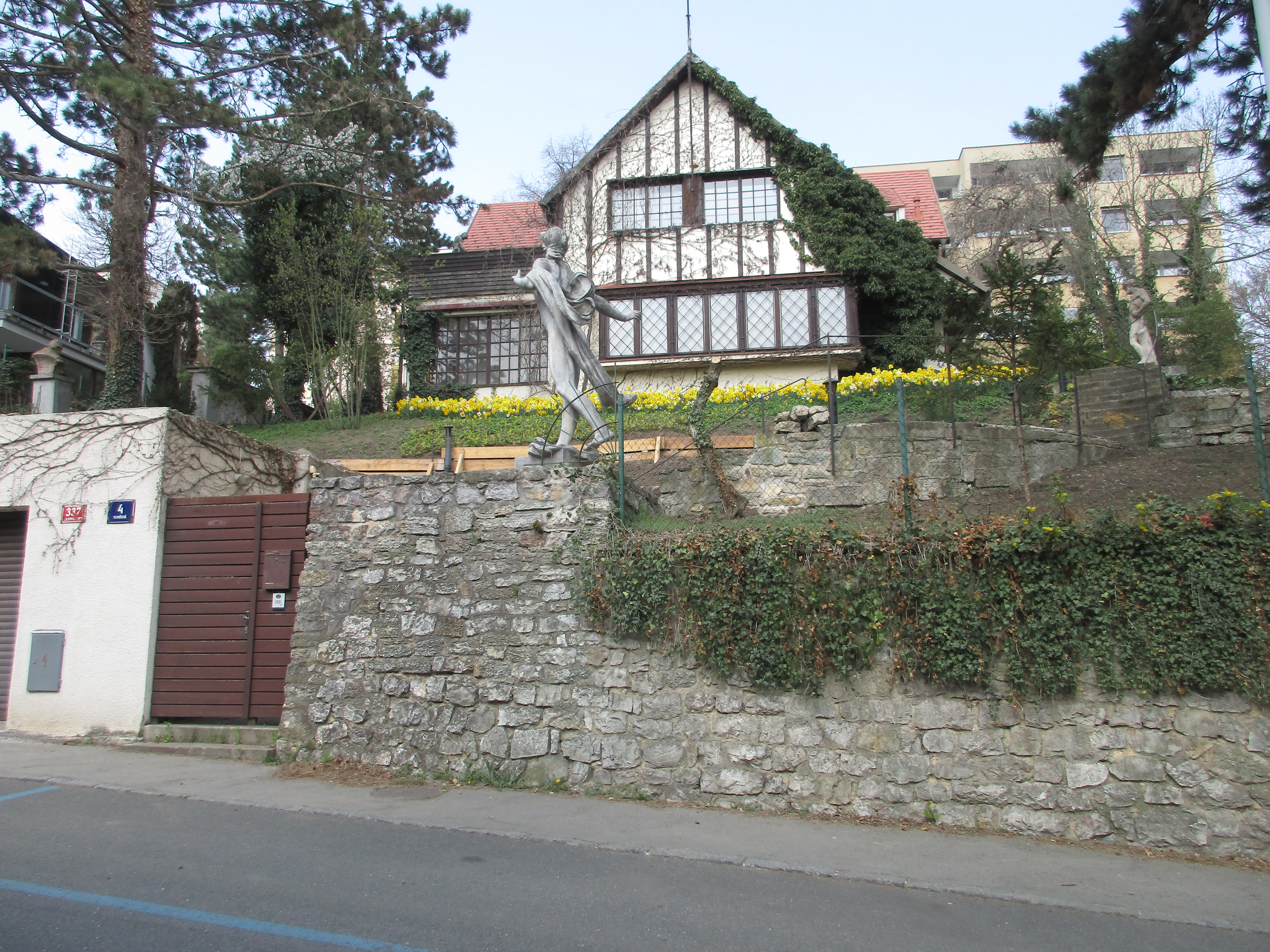 Filmařská 337/4, Praha 5-Hlubočepy